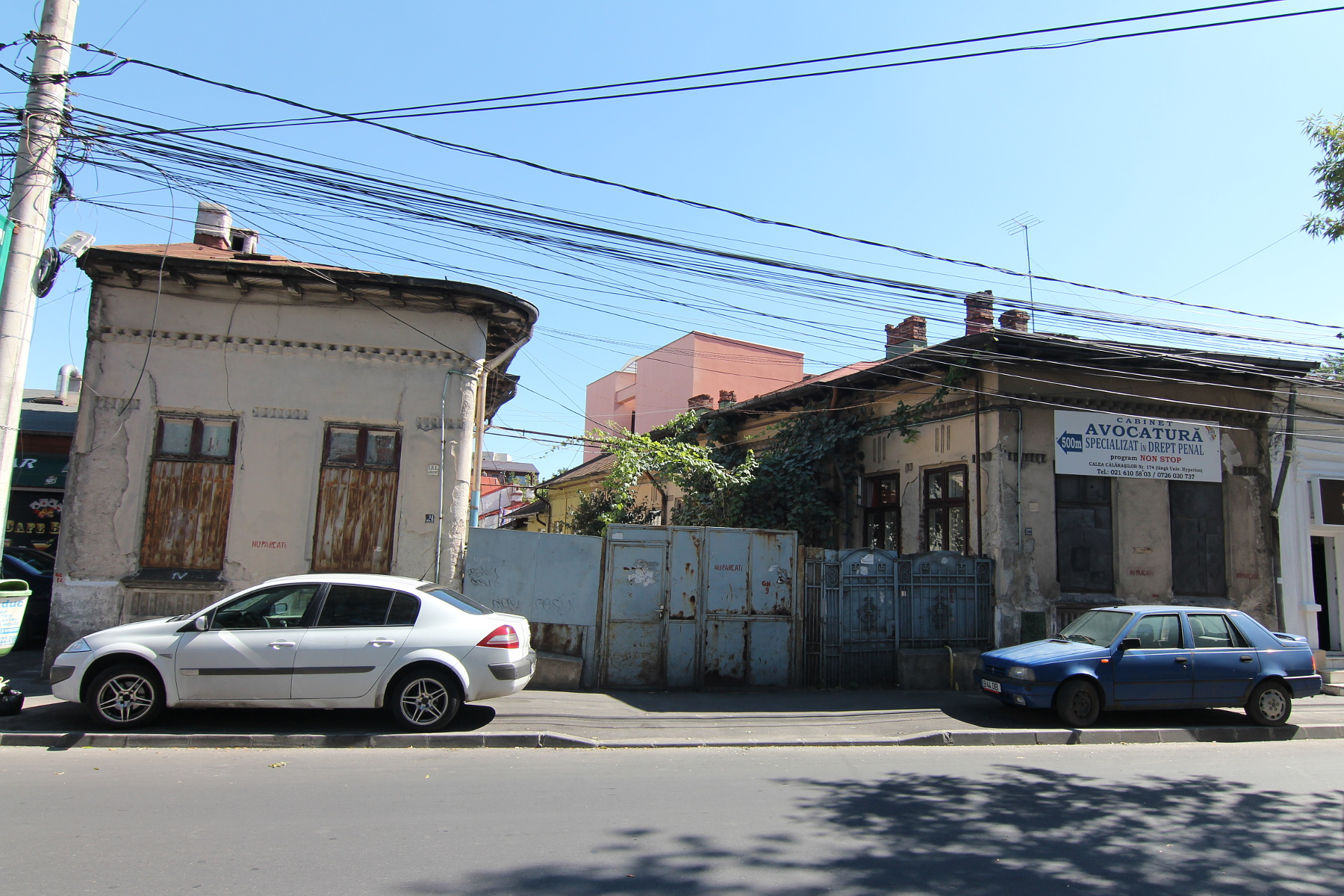 Casă pe strada Traian